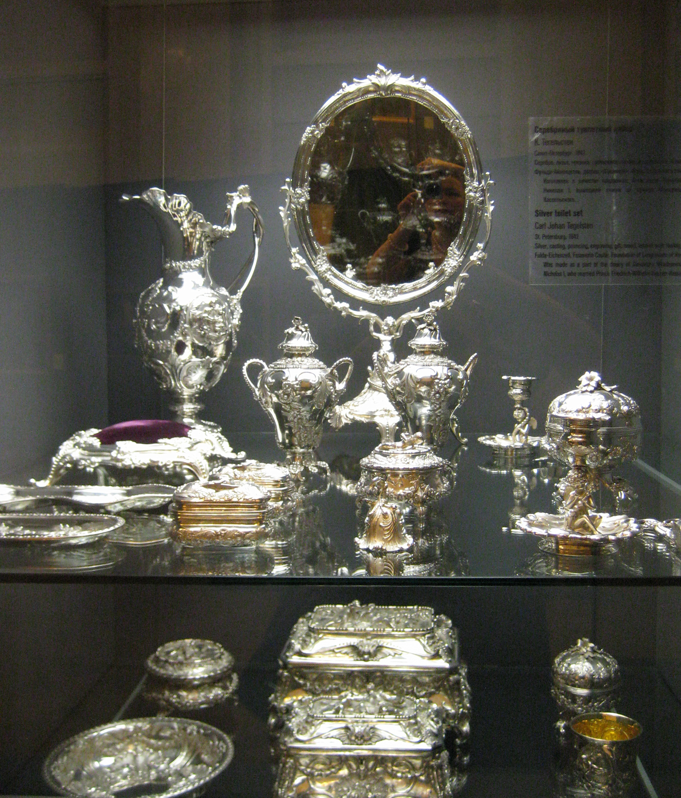 Серебряный туалетный набор. Карл Иоганн Тегельстен. Санкт-Петербург, 1842 Серебро, литье, чеканка. Фульда-Айхенцелль, дворец "Фазанери", Фонд Гессенского ландграфства. Изготовлен в качестве приданого Александре Николаевне (младшей дочери Николая I), вышедшей замуж за принца Фридриха-Вильгельма Гессен-Кассельского. Выставка «Русские и немцы: 1000 лет истории, искусства и культуры». ГИМ